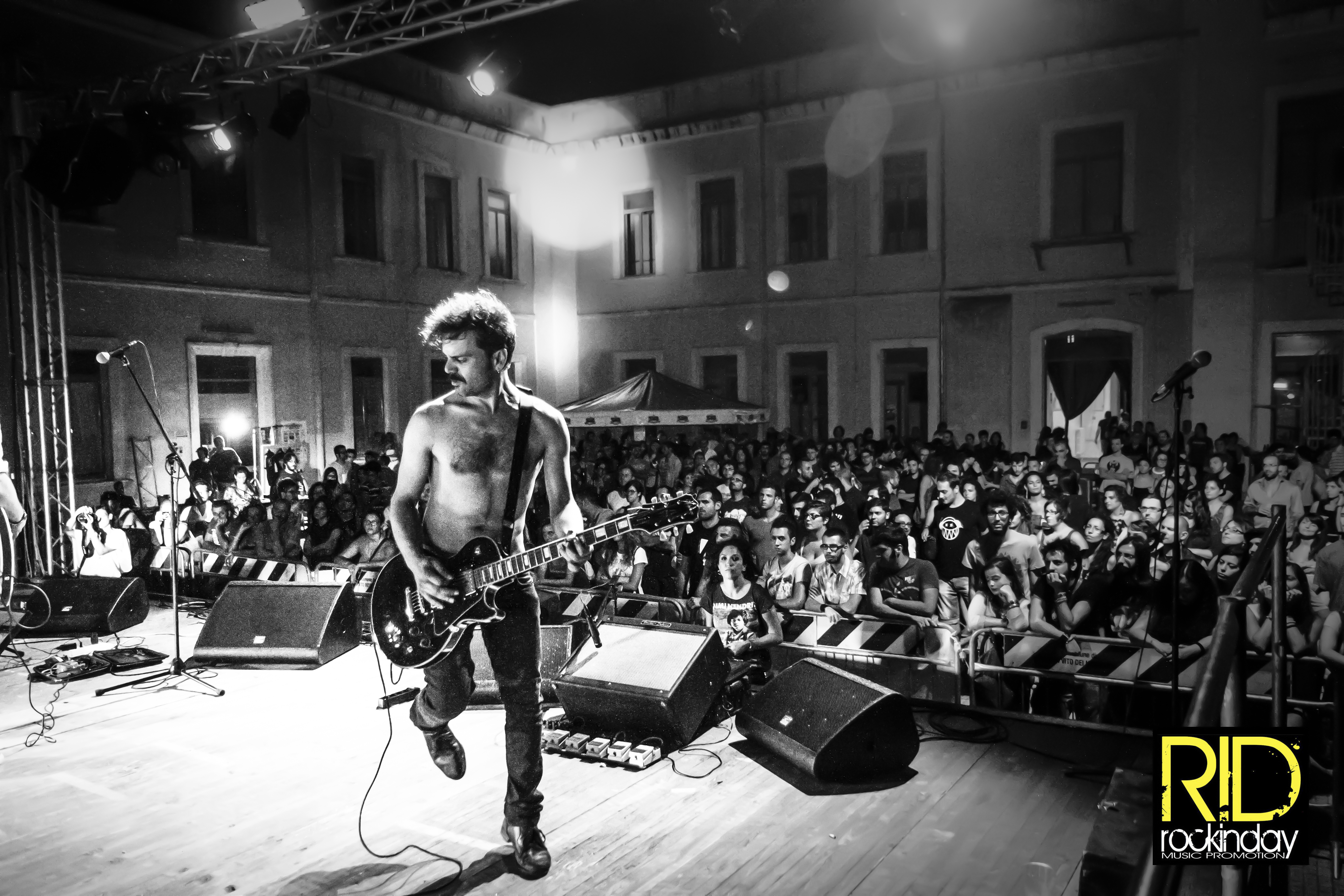 Rockinday festival edizione 2013 Foto di Gianni Alberto Passante